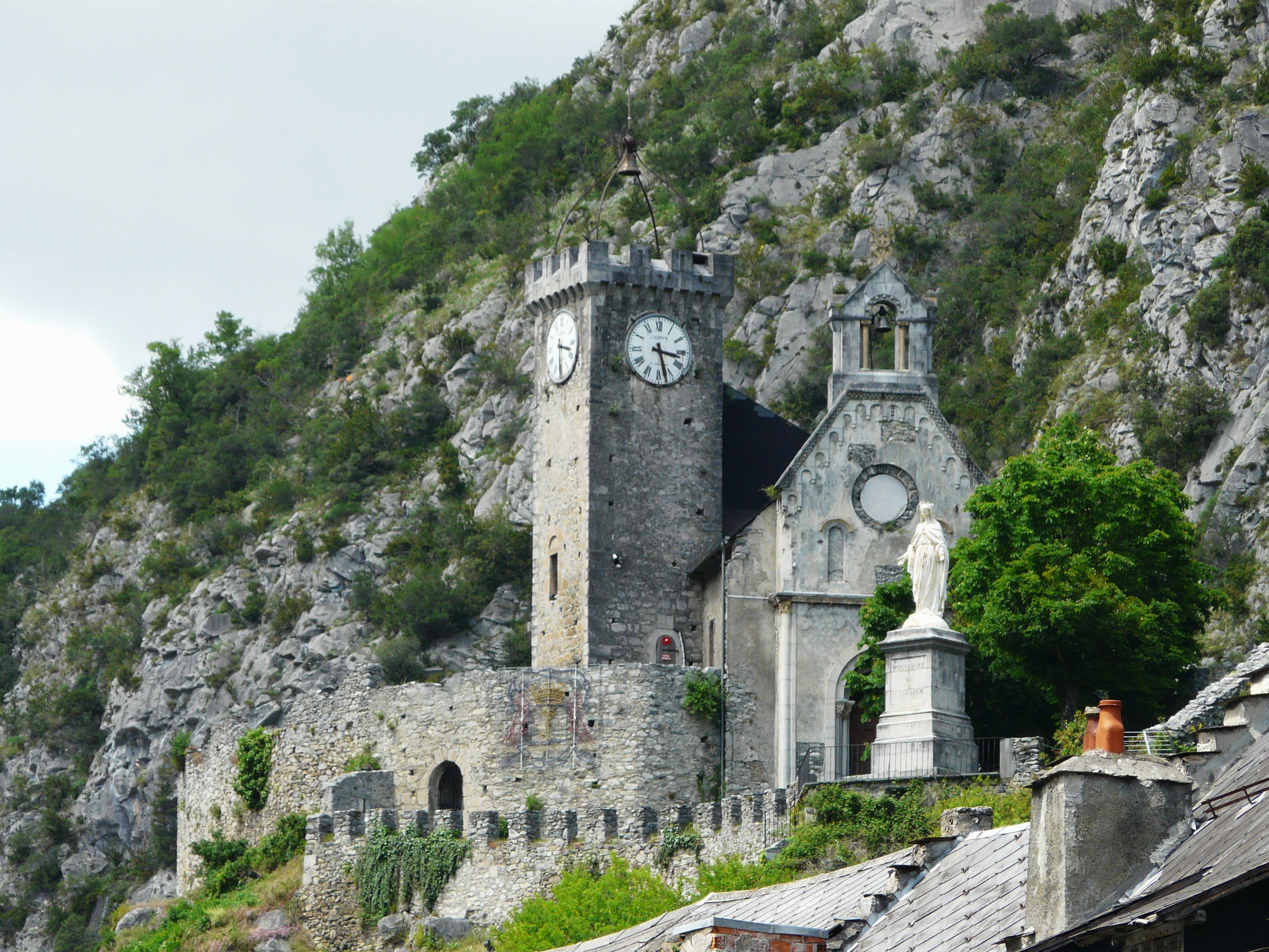 Le château fort de Saint-Béat et sa chapelle, Haute-Garonne, France.